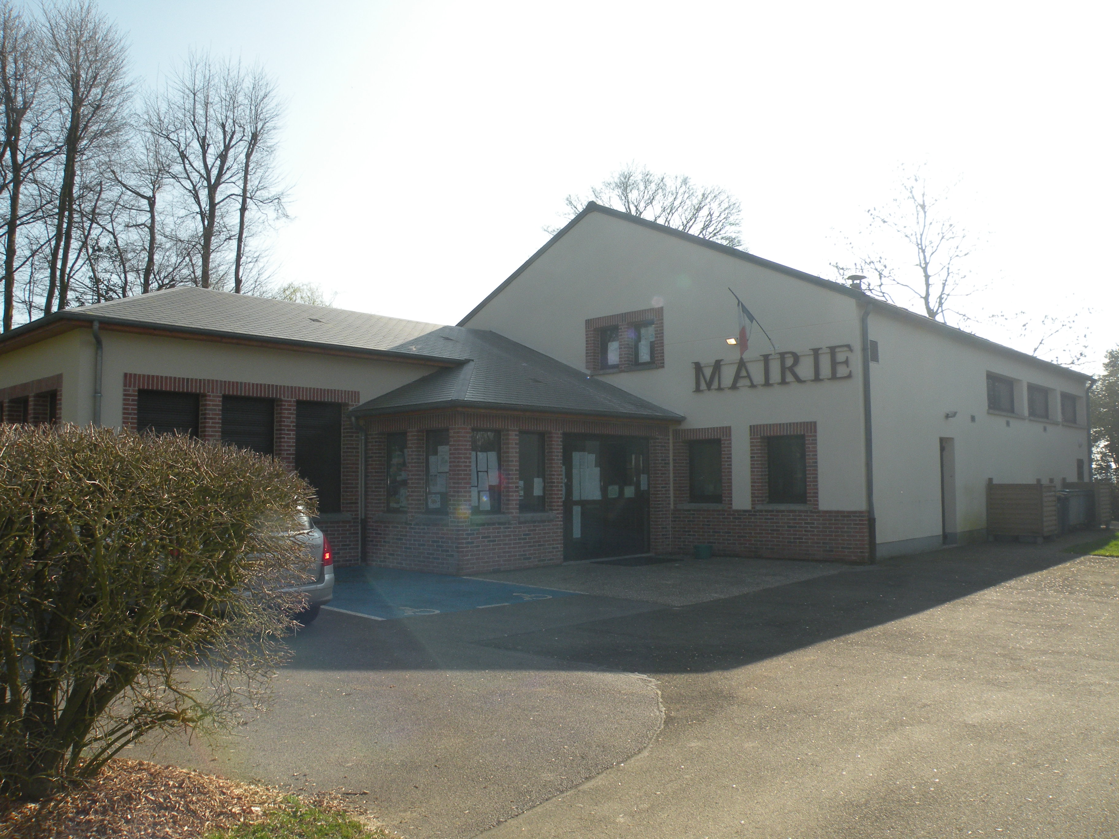 Villotran mairie